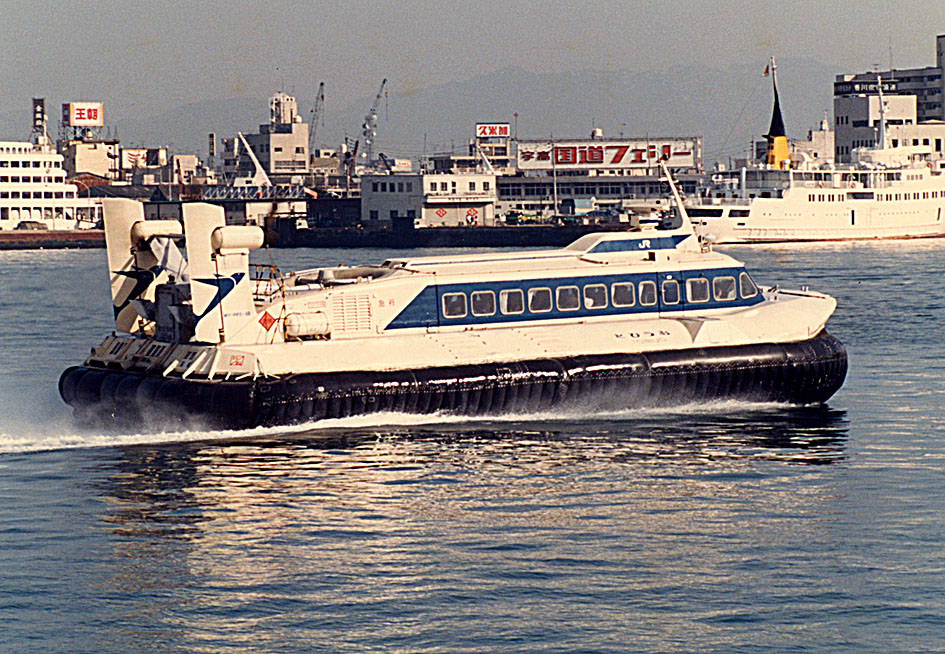 JR四国 宇高連絡船 急行便 ホーバークラフト とびうお